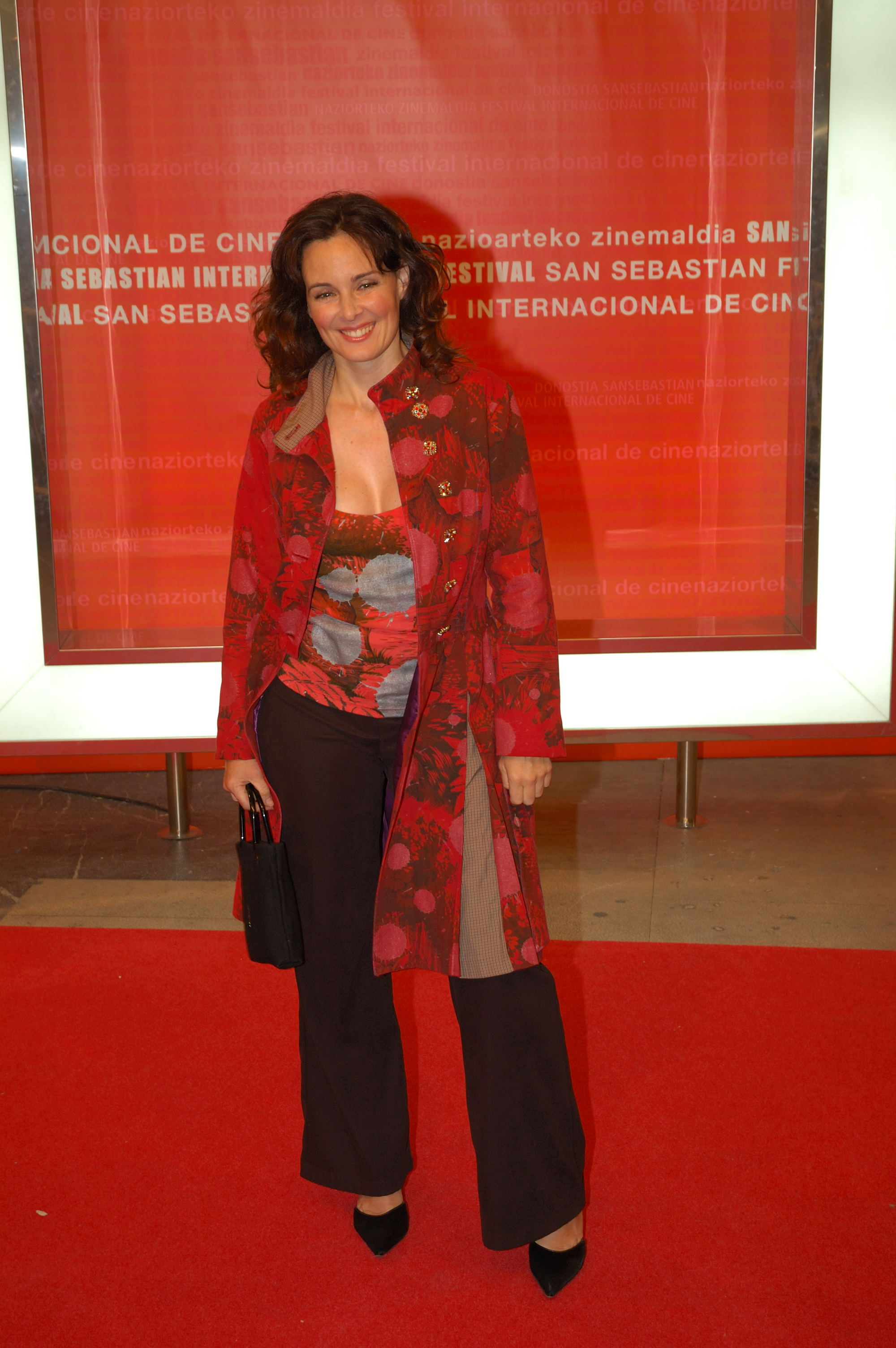 Silvia Marsó en el Festival de Cine de San Sebastián 2006.